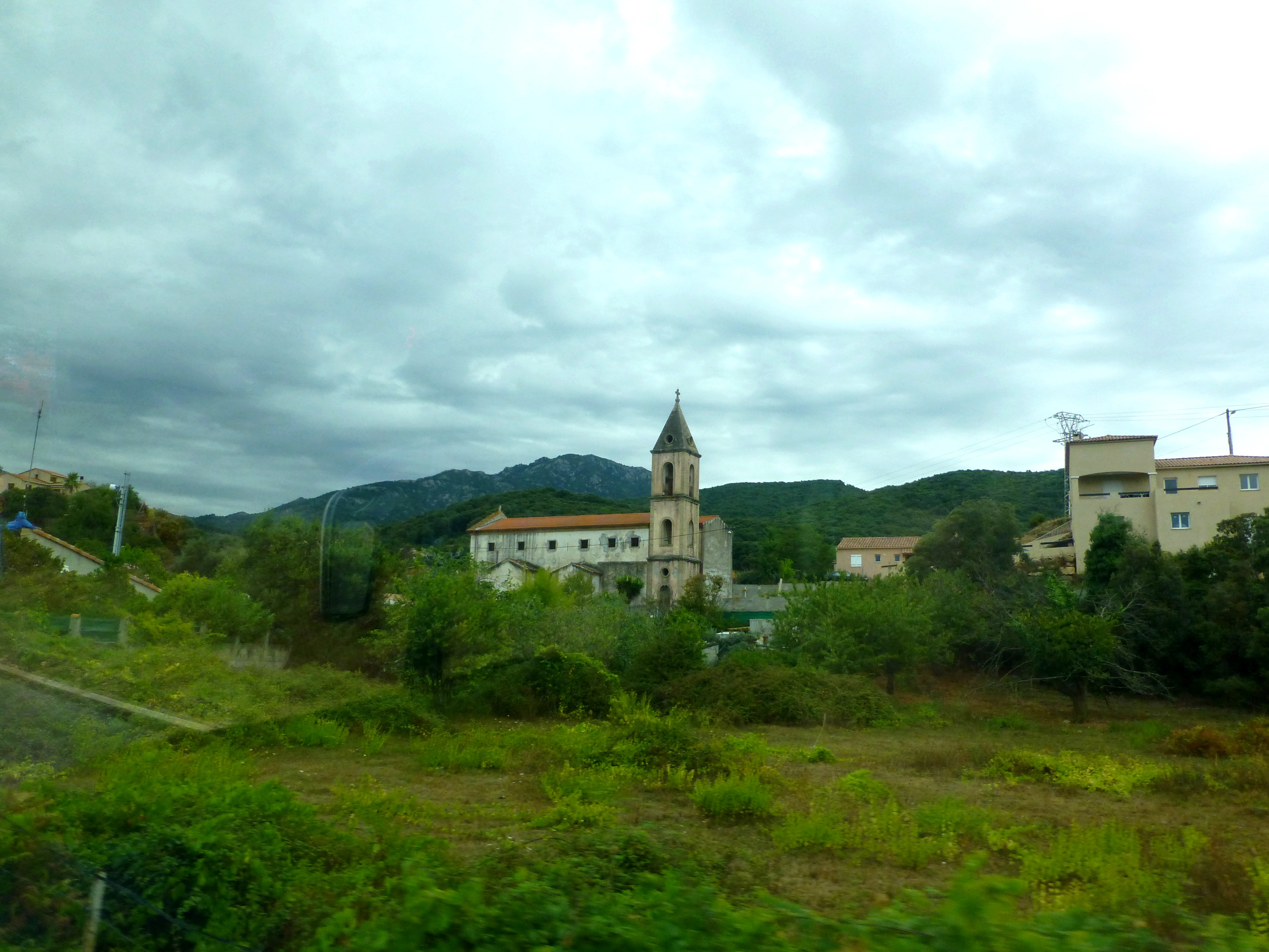 Korsika - Eglise de Cauro